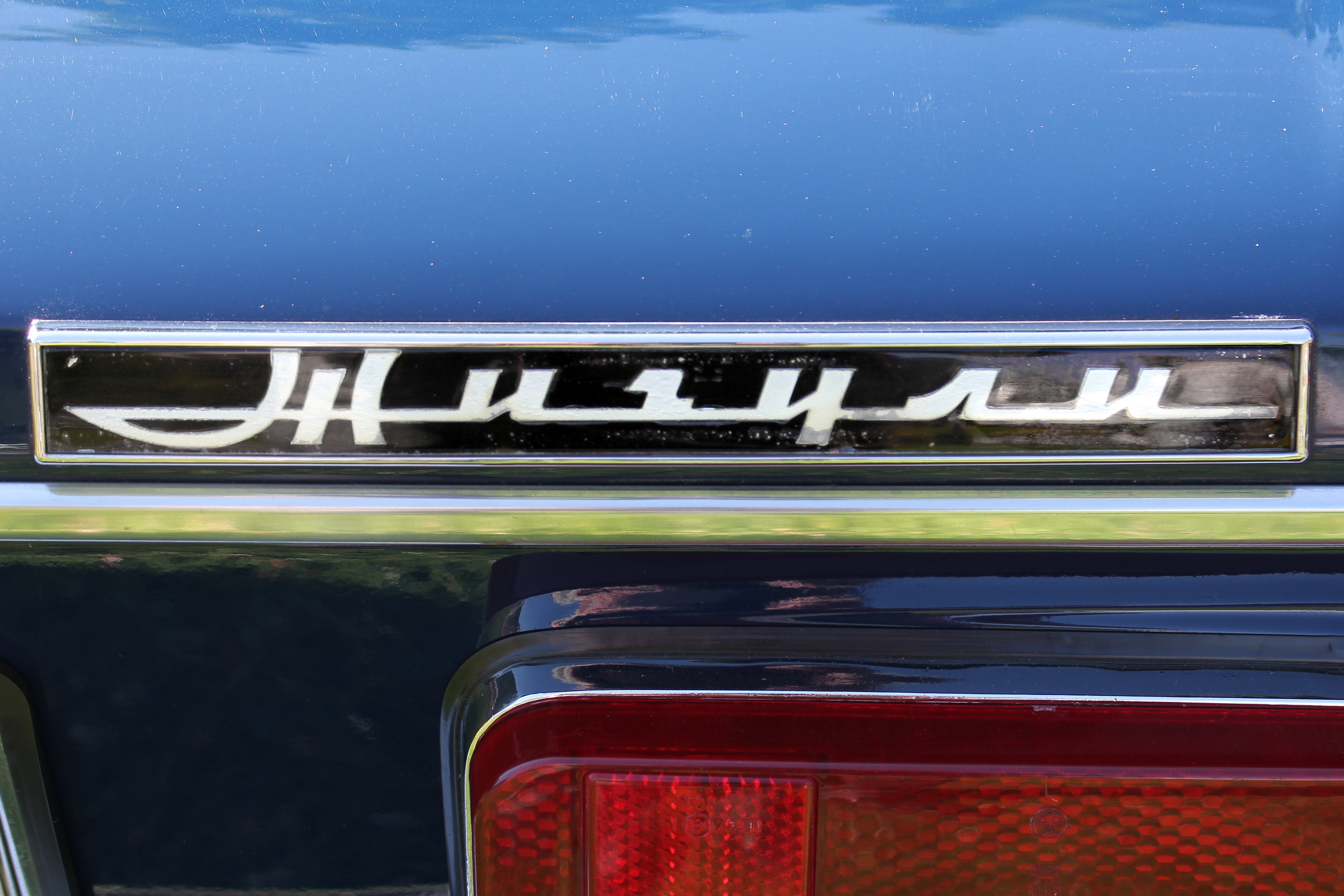 Lada – Schriftzug am Heck